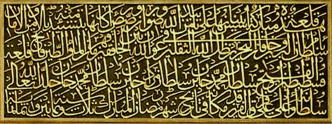 Herrschertitulatur für Sultan Mehmed II. auf einer Inschrift von 1478 am Bâb-ı Hümâyûn des Topkapı Sarayı. Entwurf von Alî b. Yahya. Abschrift: هذه قلعة مباركة أسس بنيانها على تأييد من الله ورضوان، ورصص أركانها بتشييد من الأمن والأمان بأمر سلطان البرين وخاقان البحرين ظل الله في الثقلين عون الله بين الخافقين قهرمان الماء والطين فاتح قلعة قسطنطين أبو الفتح سلطان محمد خان بن سلطان مراد خان بن سلطان محمد خان خلد الله تعالى سلطانه وأعلى على فرق الفرقدين مكانه في تاريخ شهر رمضان المبارك سنة ثلاث وثمانين وثمانمائة Deutsche Übersetzung bei Klaus Kreiser: Istanbul. Ein historisch-literarischer Stadtführer. München 2001, S. 89